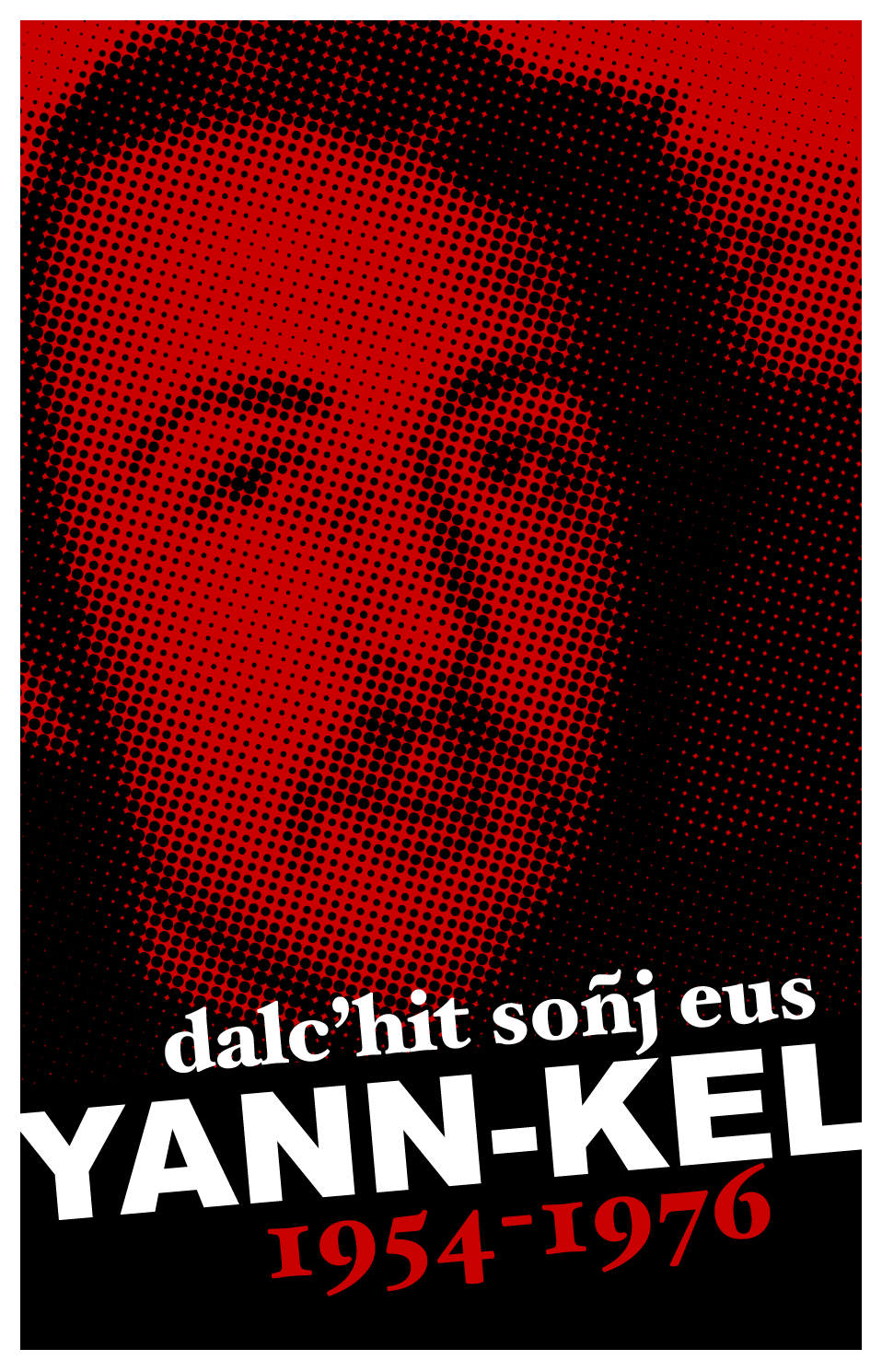 Yann-Kel Kernaleguen